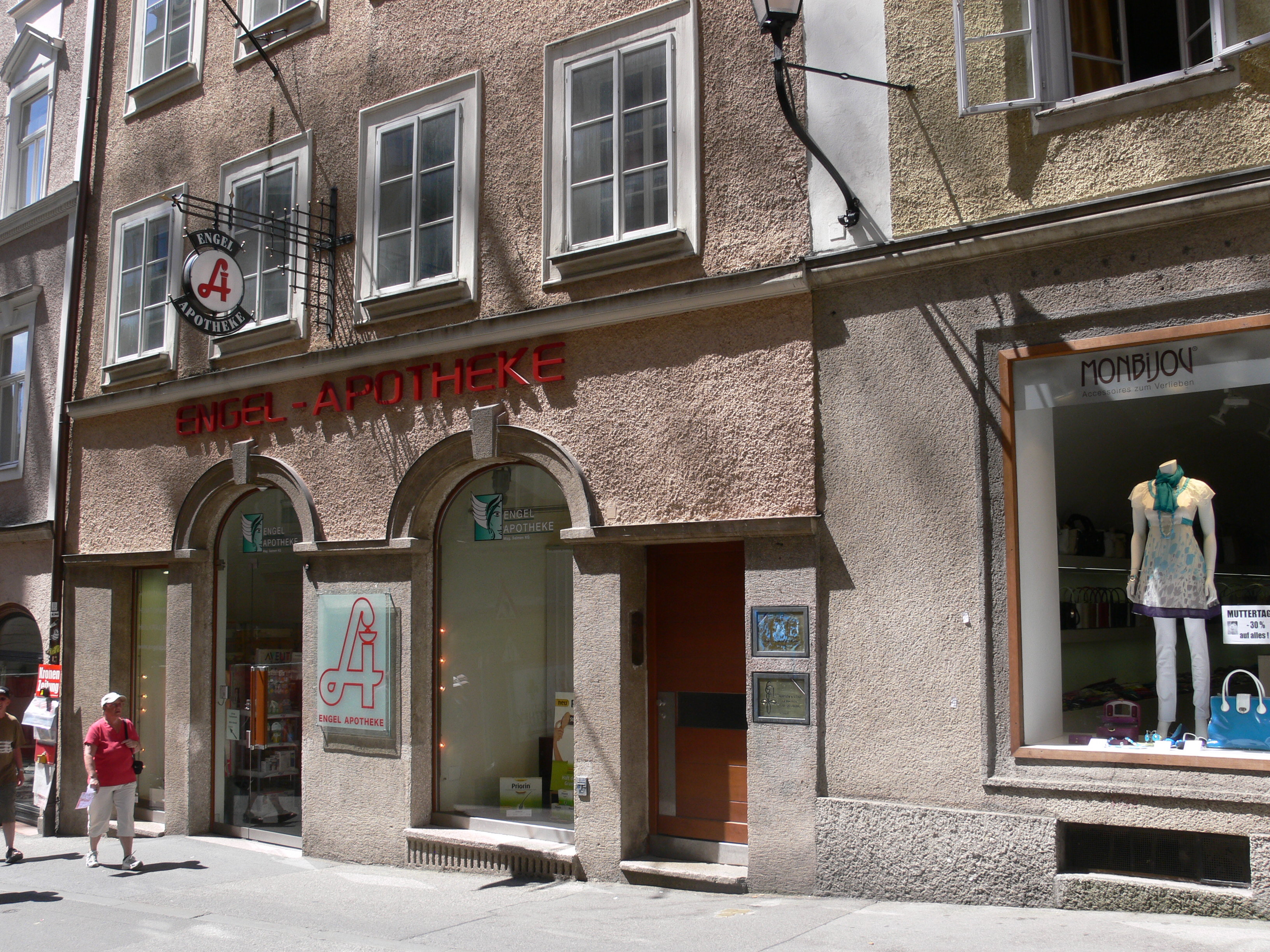 Engel-Apotheke, Linzer Gasse, Salzburg (Hier absolvierte Georg Trakl sein Apotheken-Praktikum.)